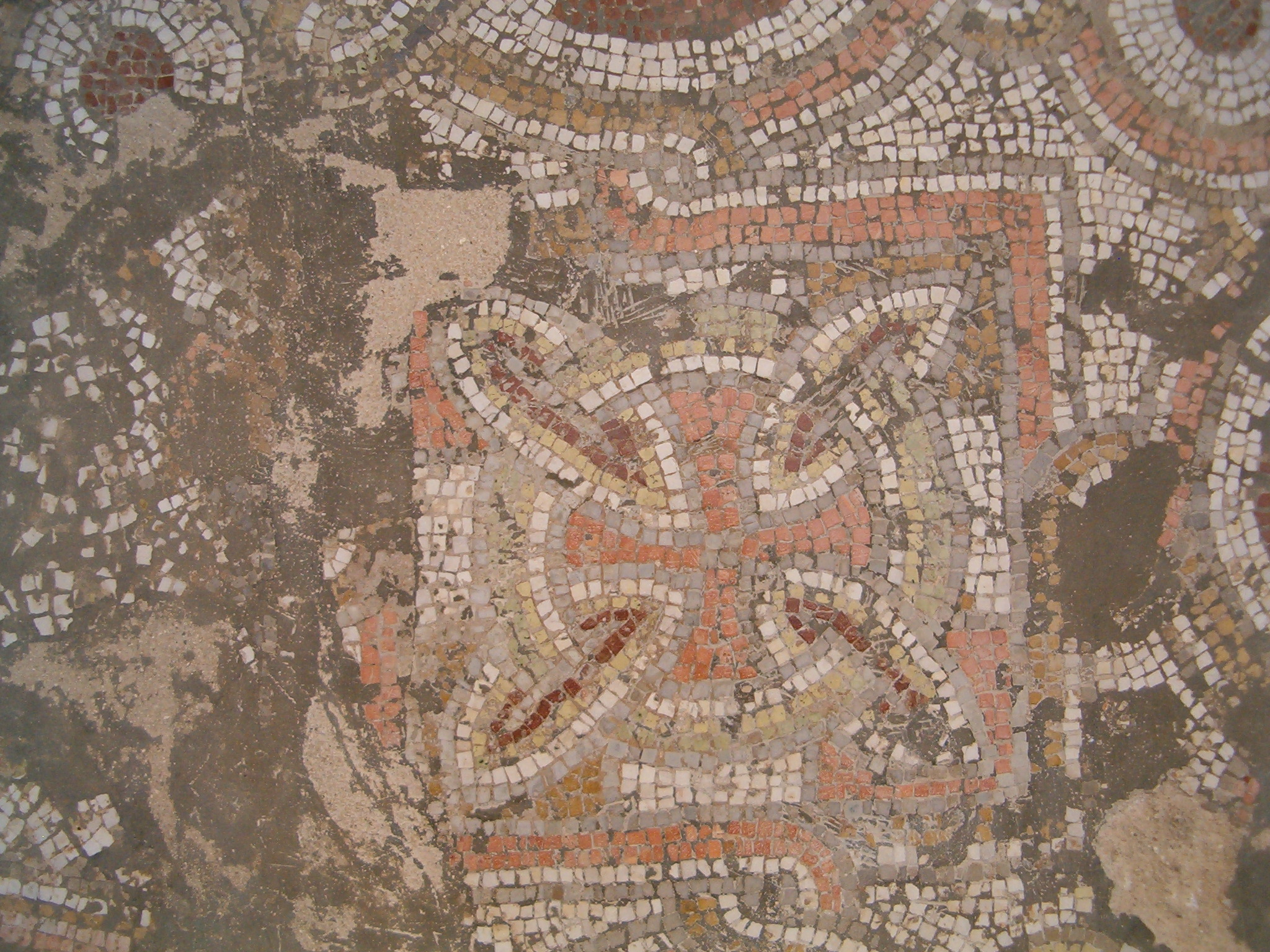 בית ג'מל - פסיפס מהמאה החמישית בקיר החיצוני של כנסיית סטפנוס.